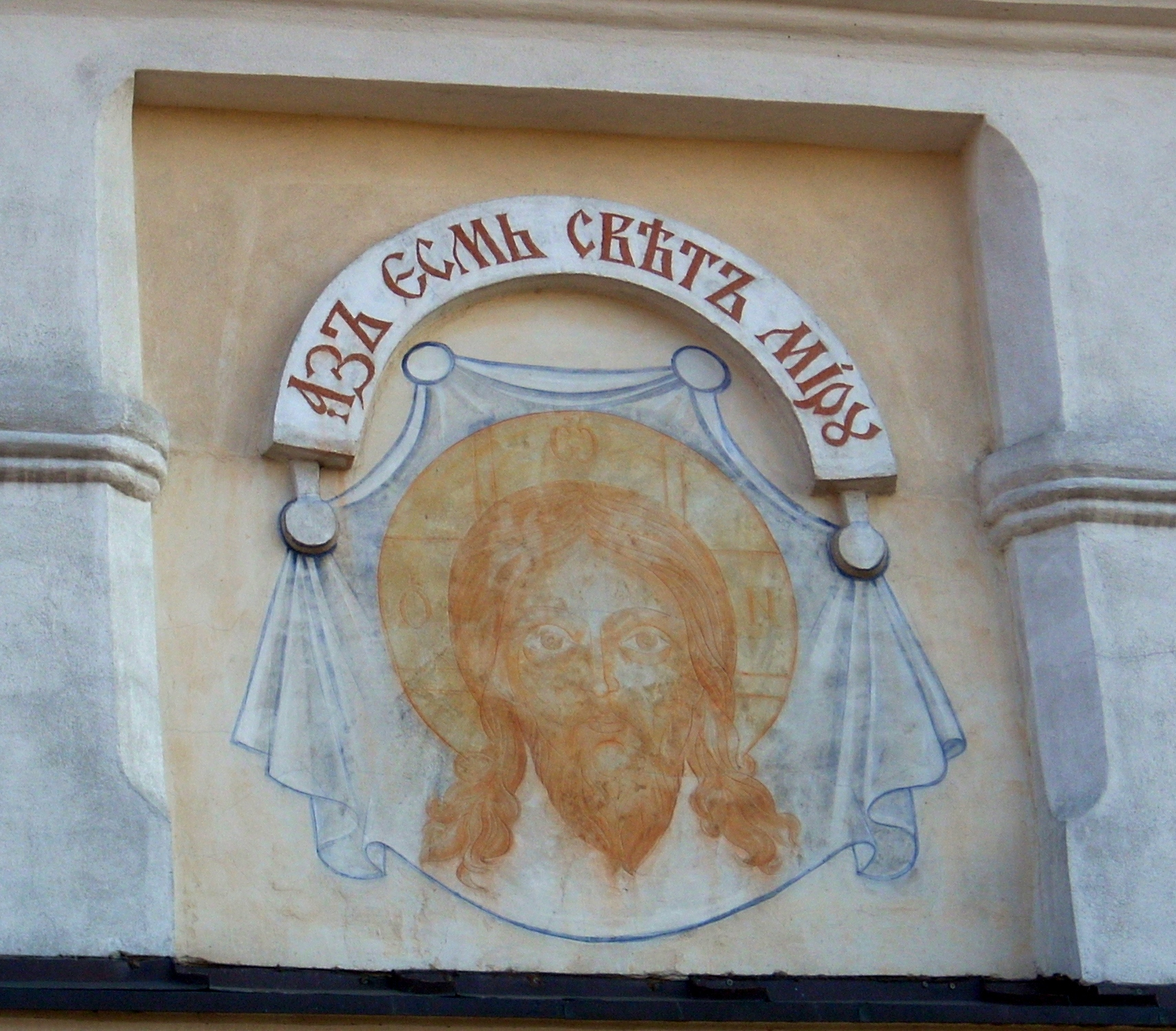 Fresk-Obraz Chrystusa Nie Ludzką Ręką Uczynionego na fasadzie cerkwi w Siemiatyczach